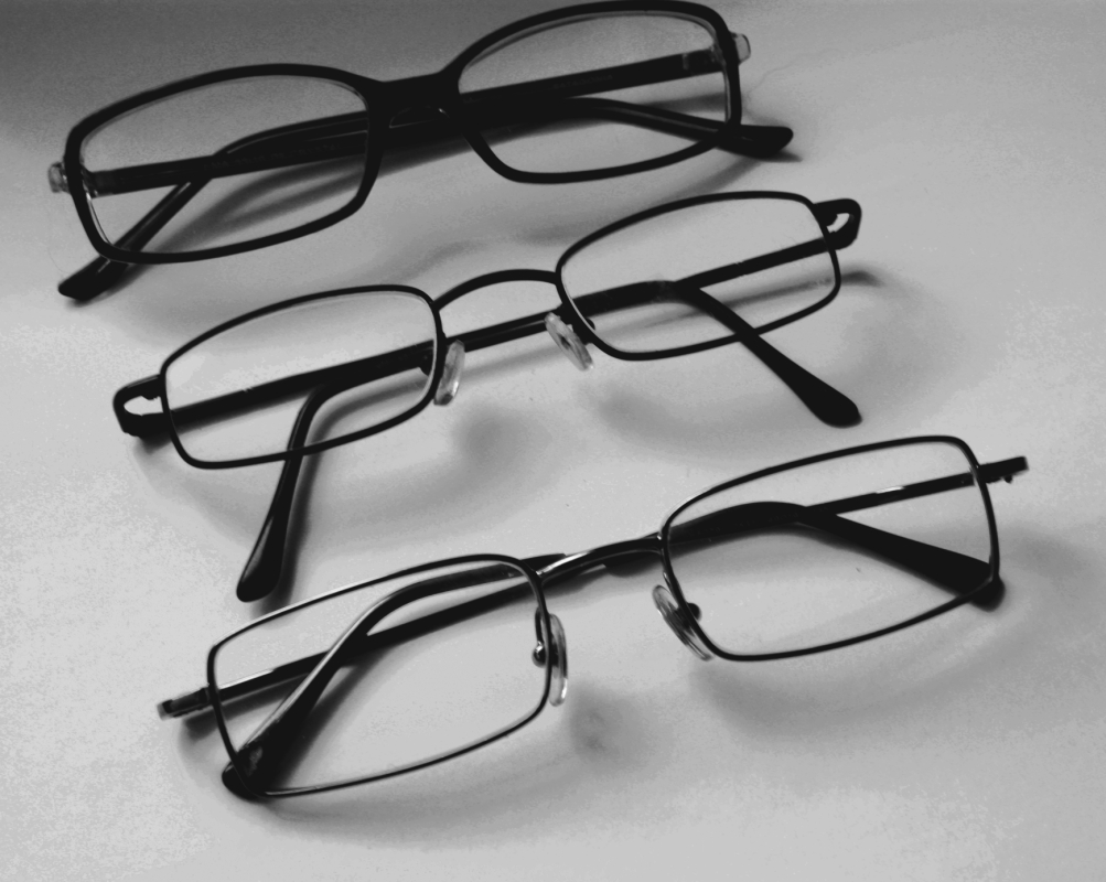 Okulary